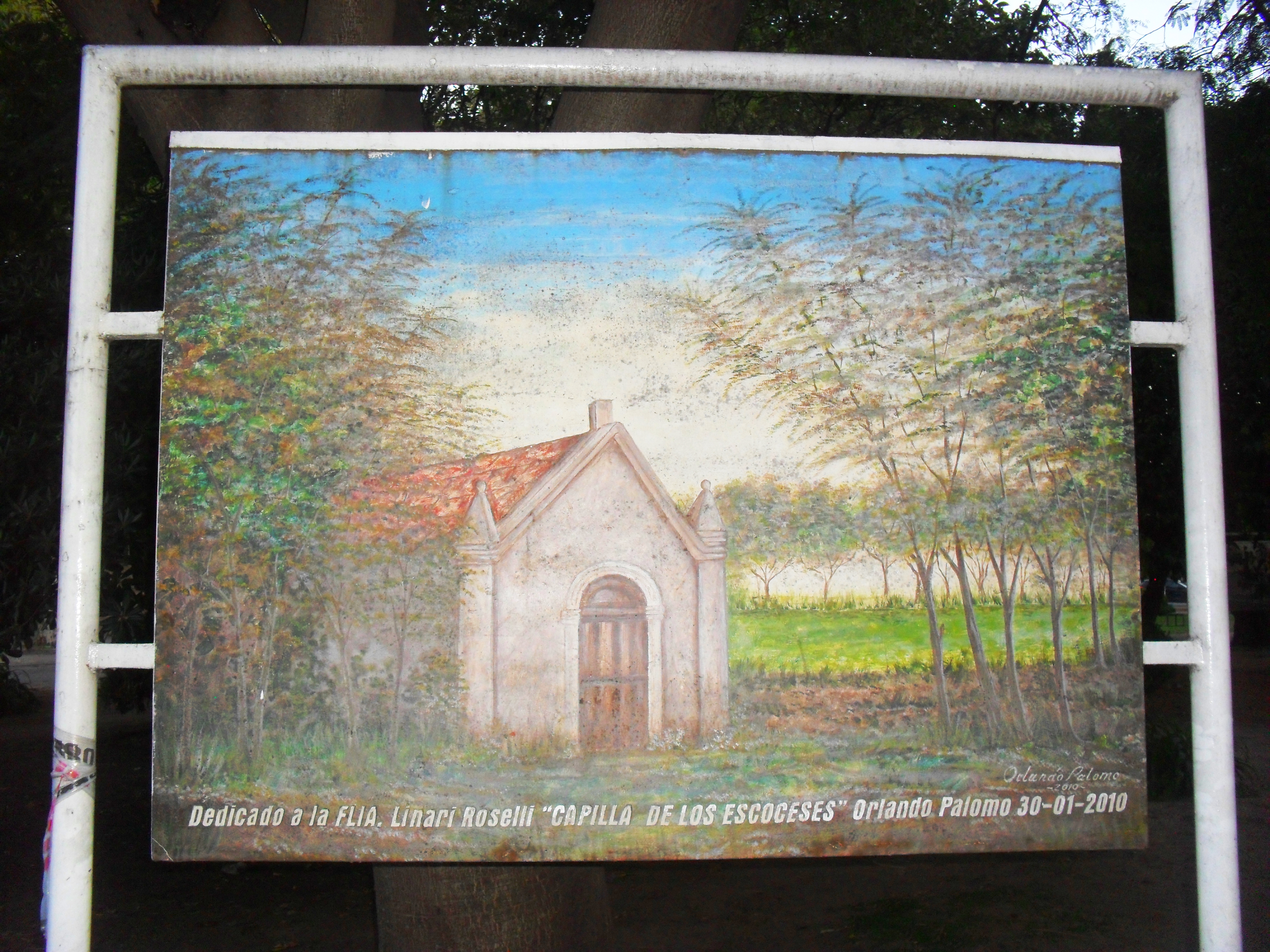 Plazoleta cuadro capilla